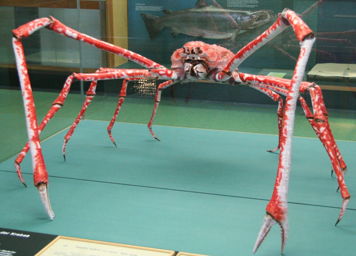 Japanische Riesenkrabbe (Macrocheira kaempferi)